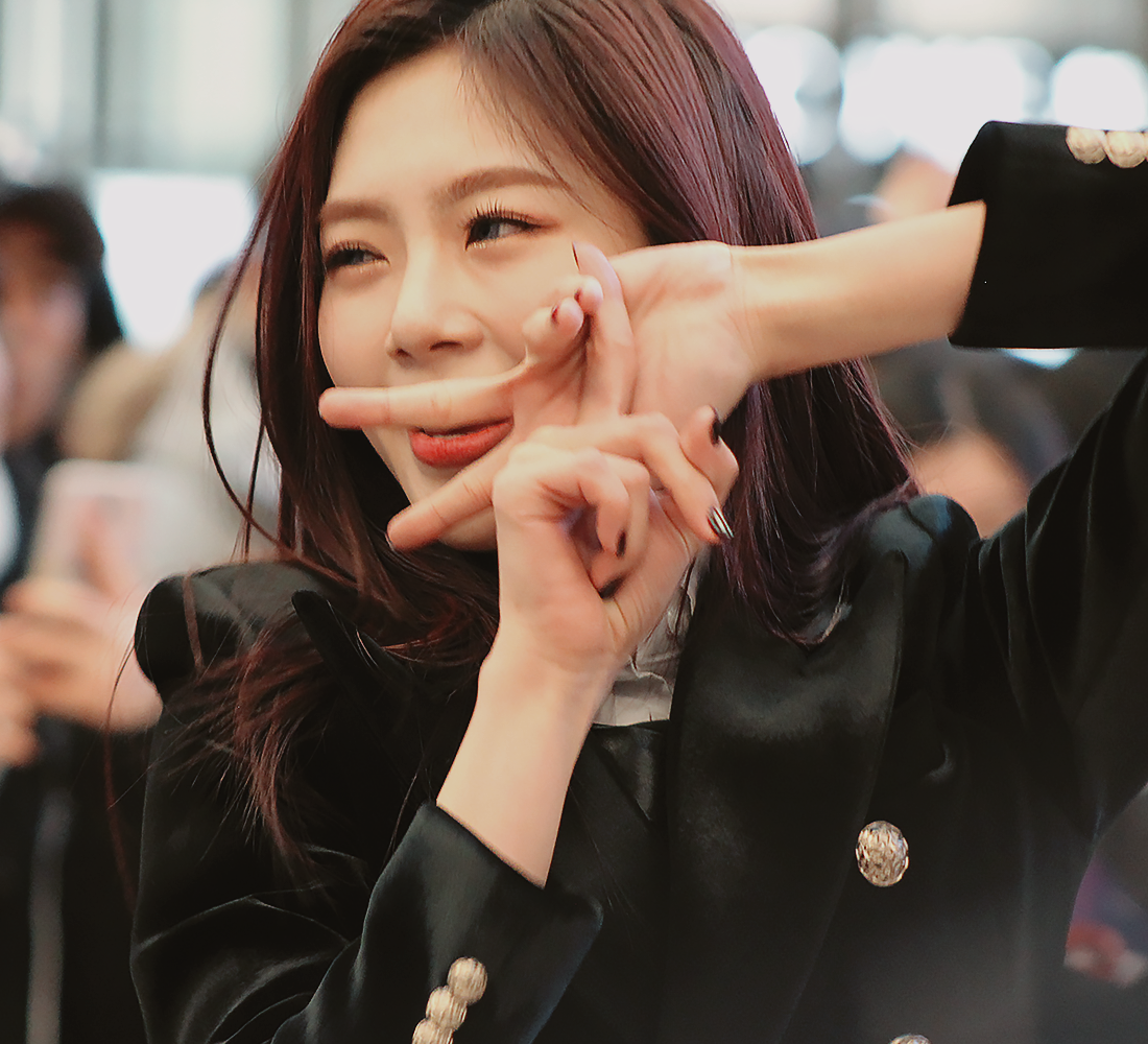 180127 DREAMCATCHER 드림캐쳐 분당 버스킹 JIU 지유